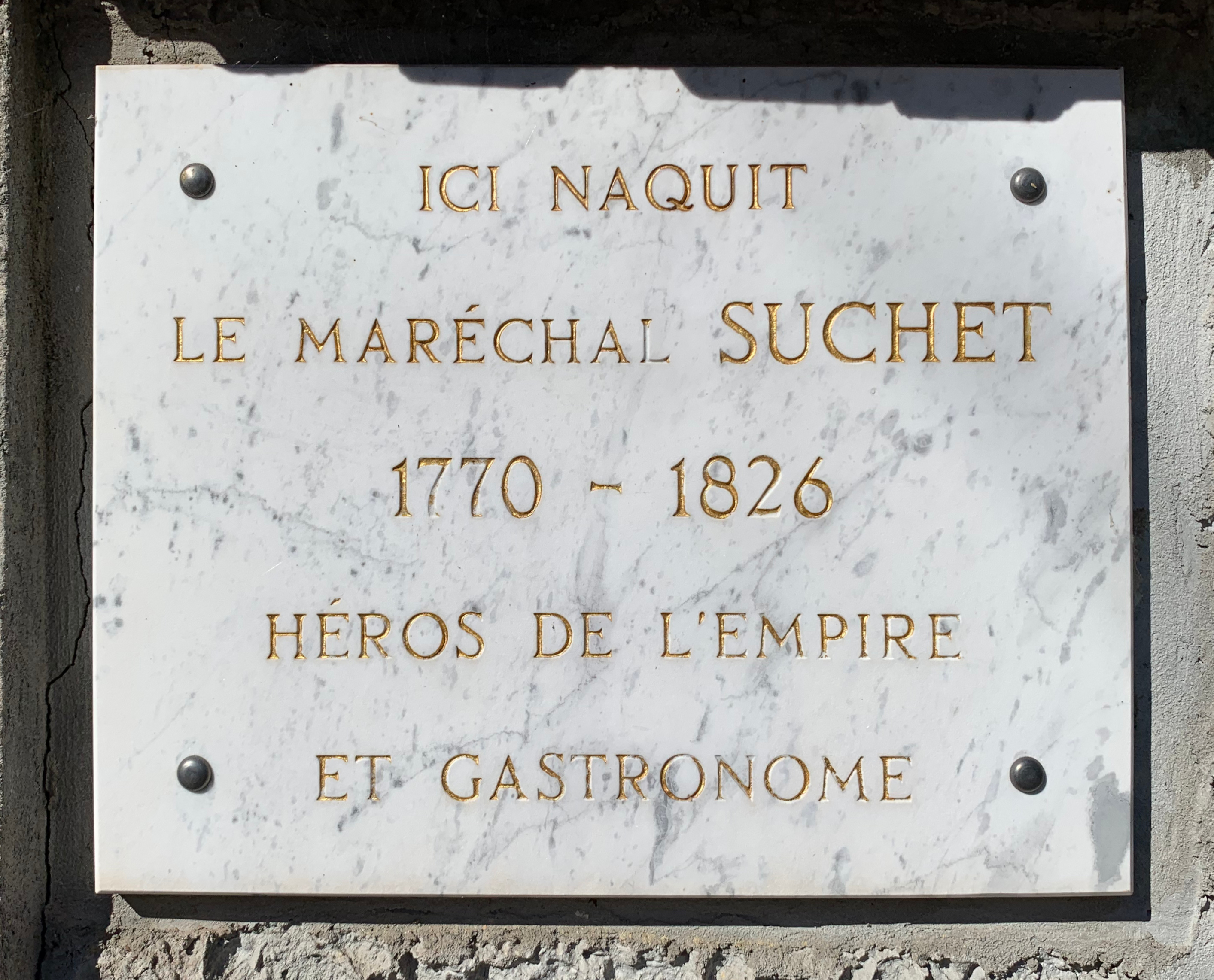 Plaque maison natale de Suchet (Lyon). recto in engraving: ICI NAQUIT LE MARECHAL SUCHET 1770 - 1826 HEROS DE L'EMPIRE ET GASTRONOME